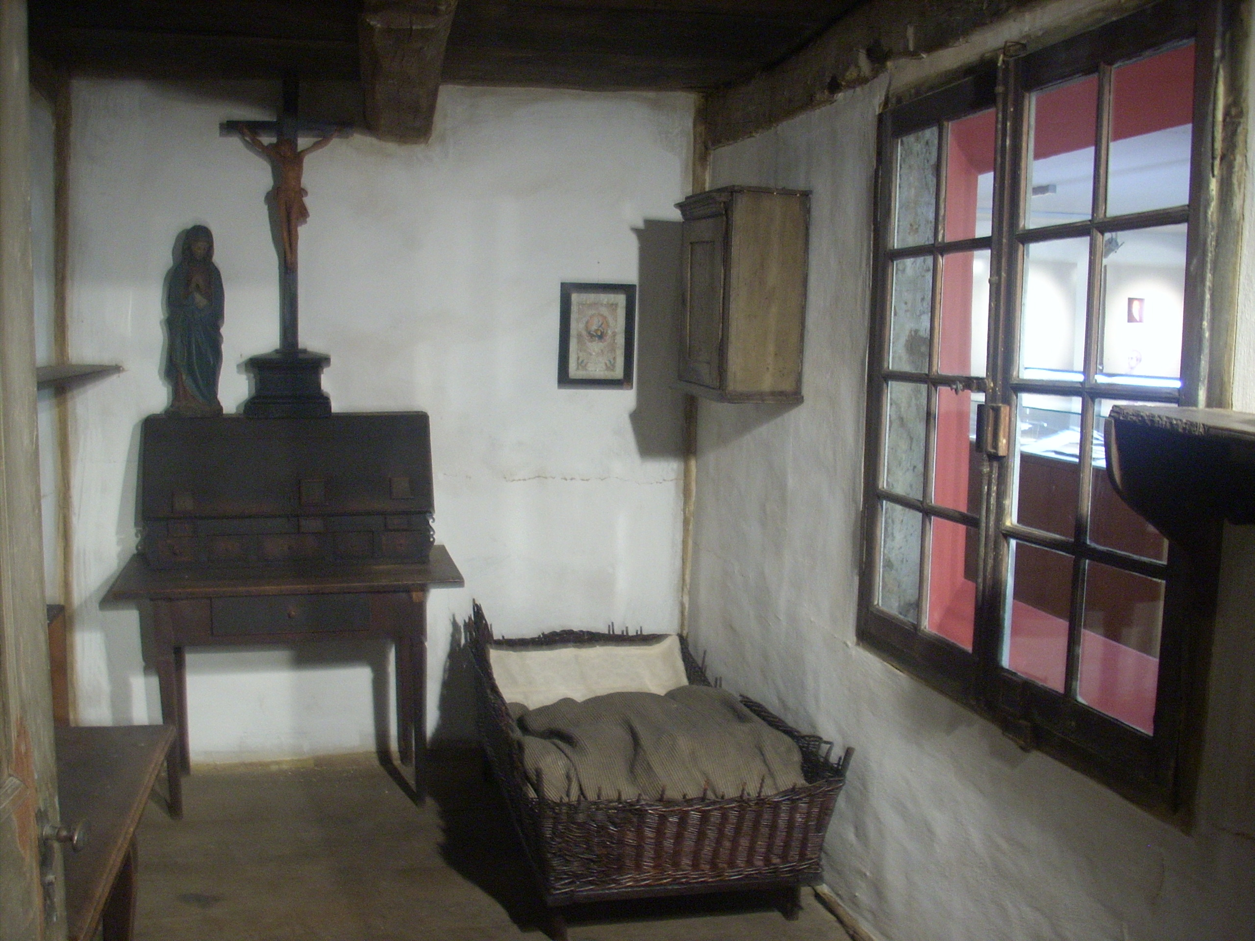 Dülmen, Hl.-Kreuz-Kirche, Gedenkstätte Sel. Anna Katharina Emmerick, rekonstruiertes Sterbezimmer mit originaler Einrichtung